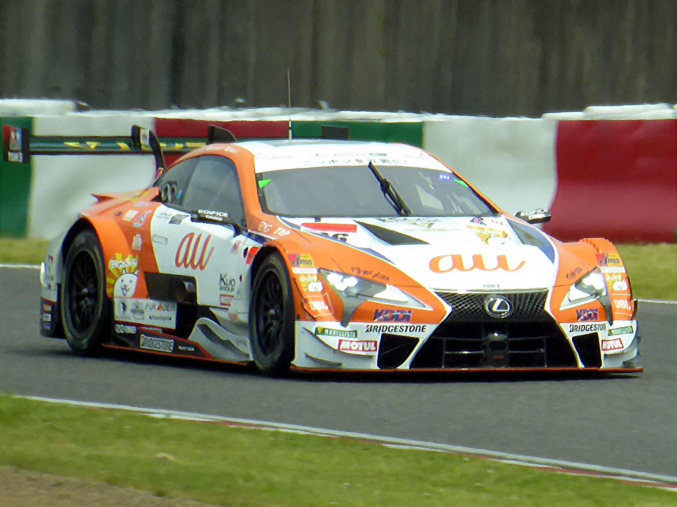 2019年鈴鹿GT300kmにおいて36号車au TOM'S LC500を撮影。